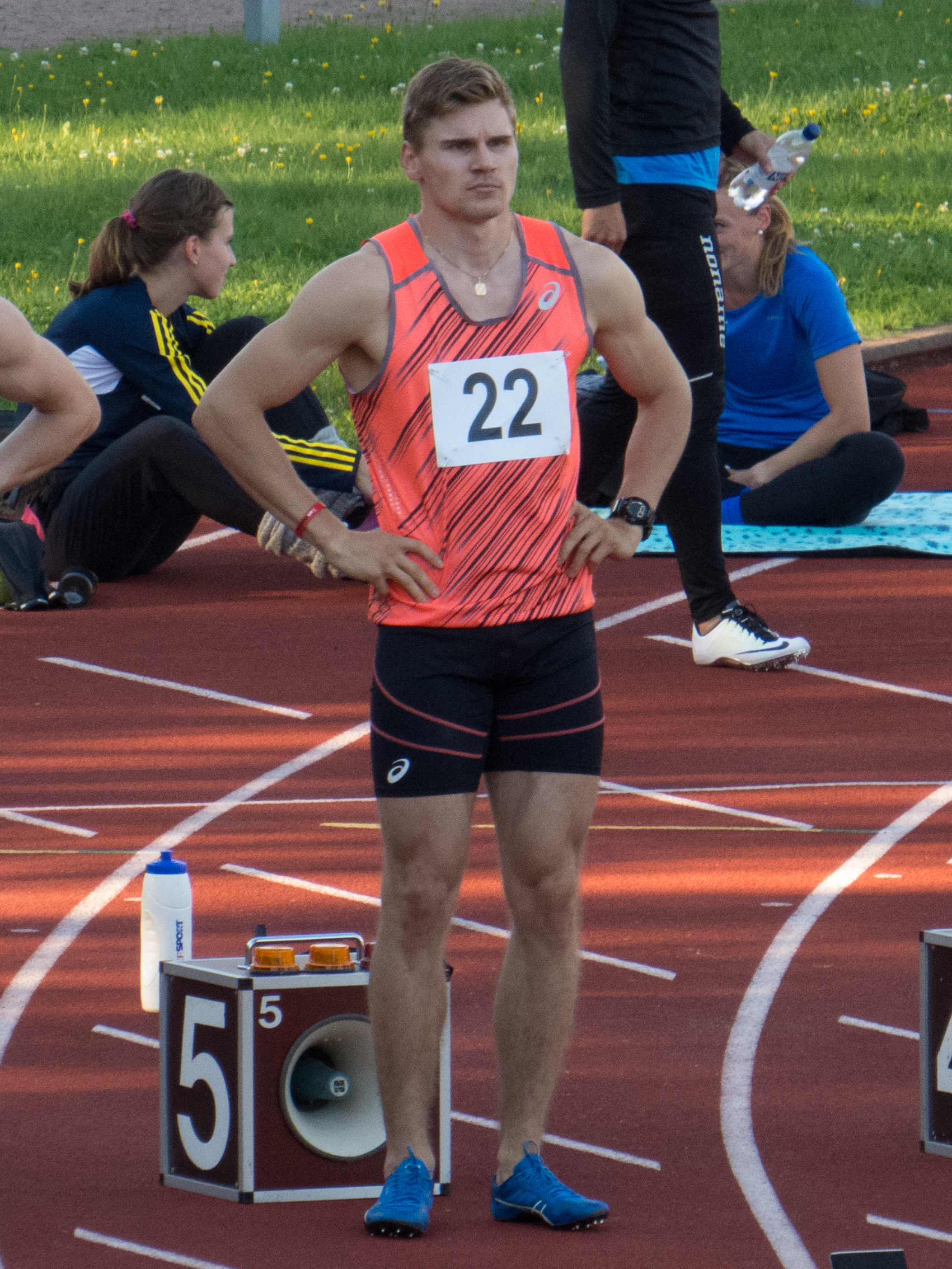 Elmo Lakka, suomalainen pikajuoksija vuonna 2016.